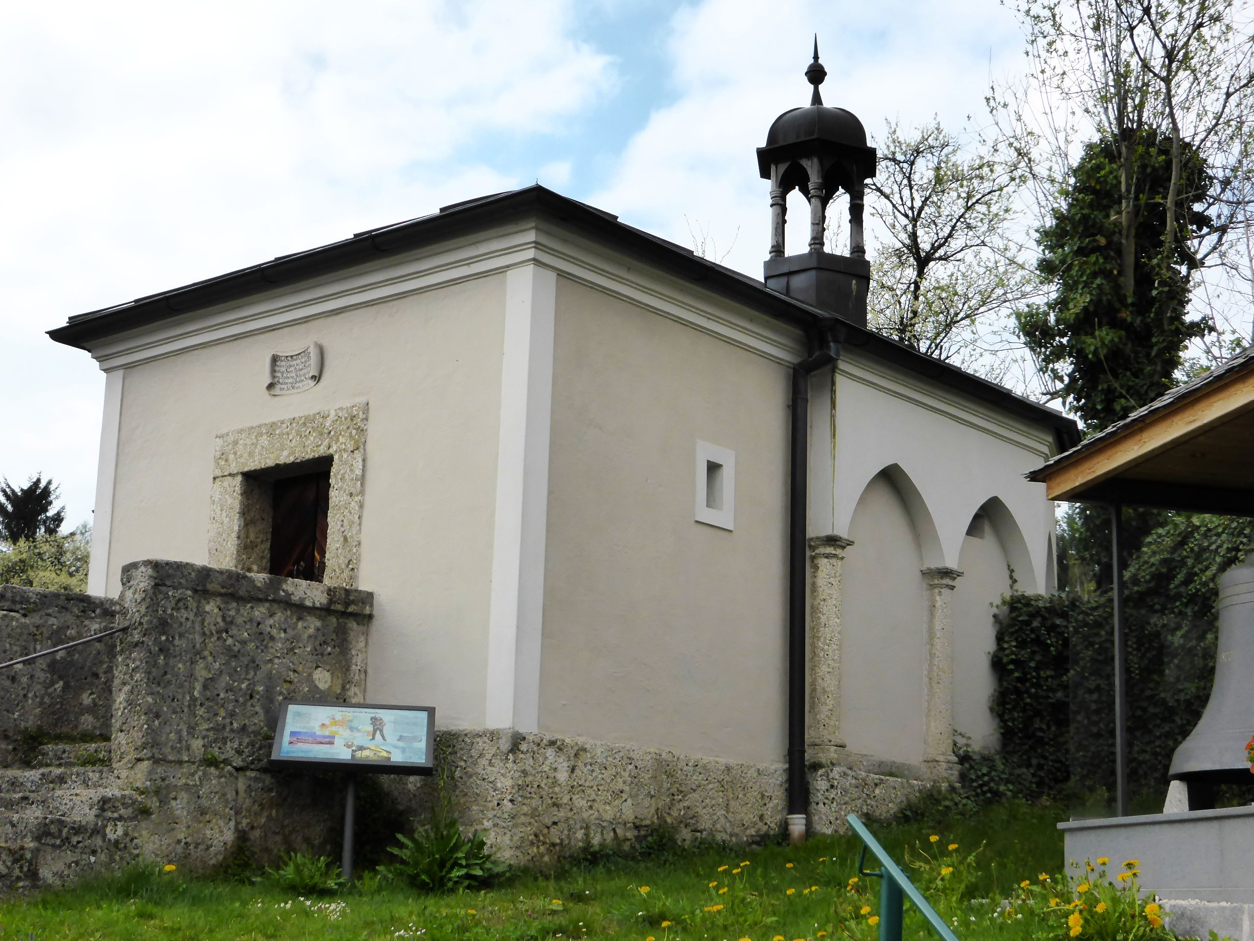 Hl.-Grab(kapelle) Heiliges Grab